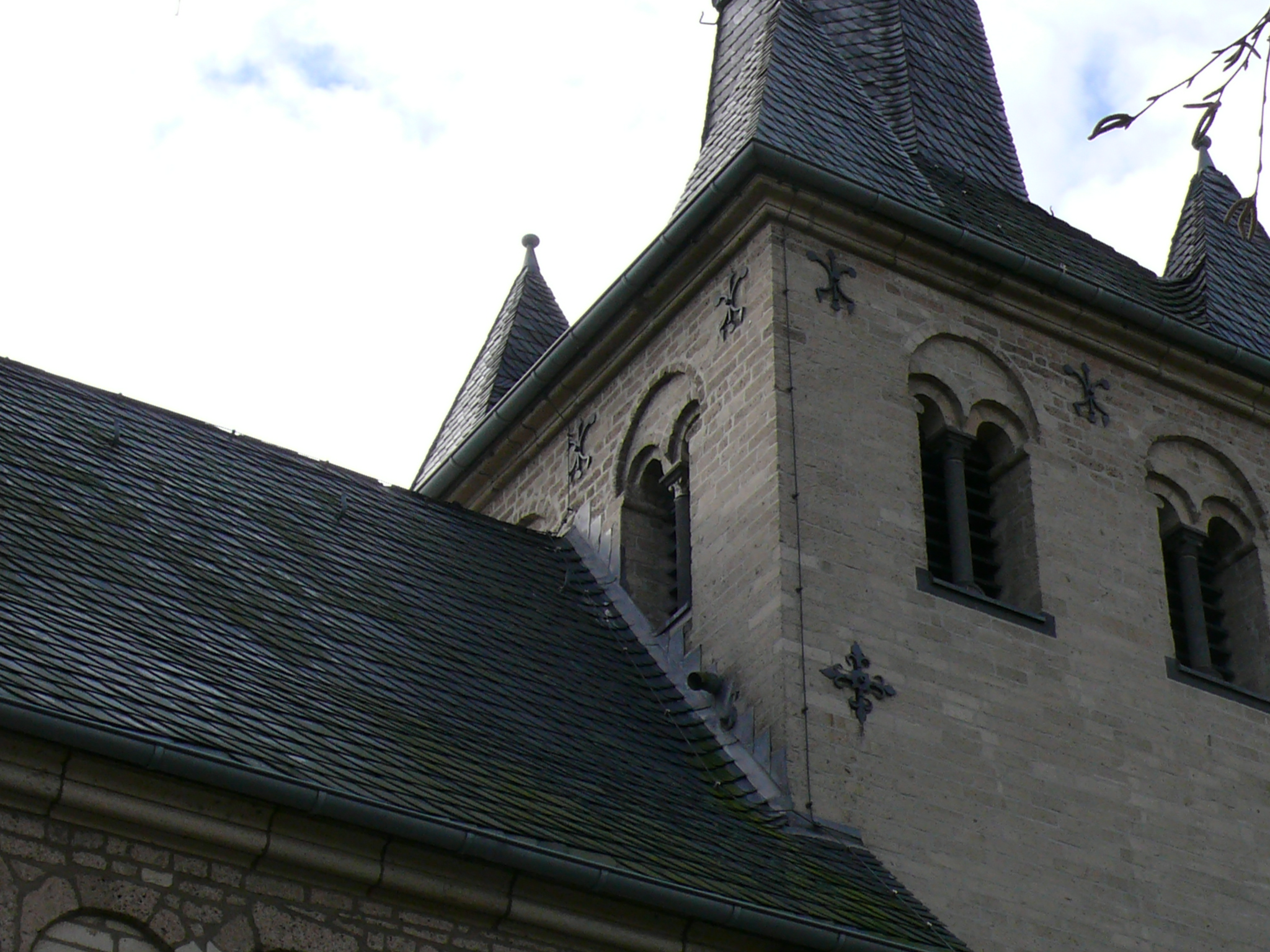 Kirchendach der Kirche Sankt Brictius